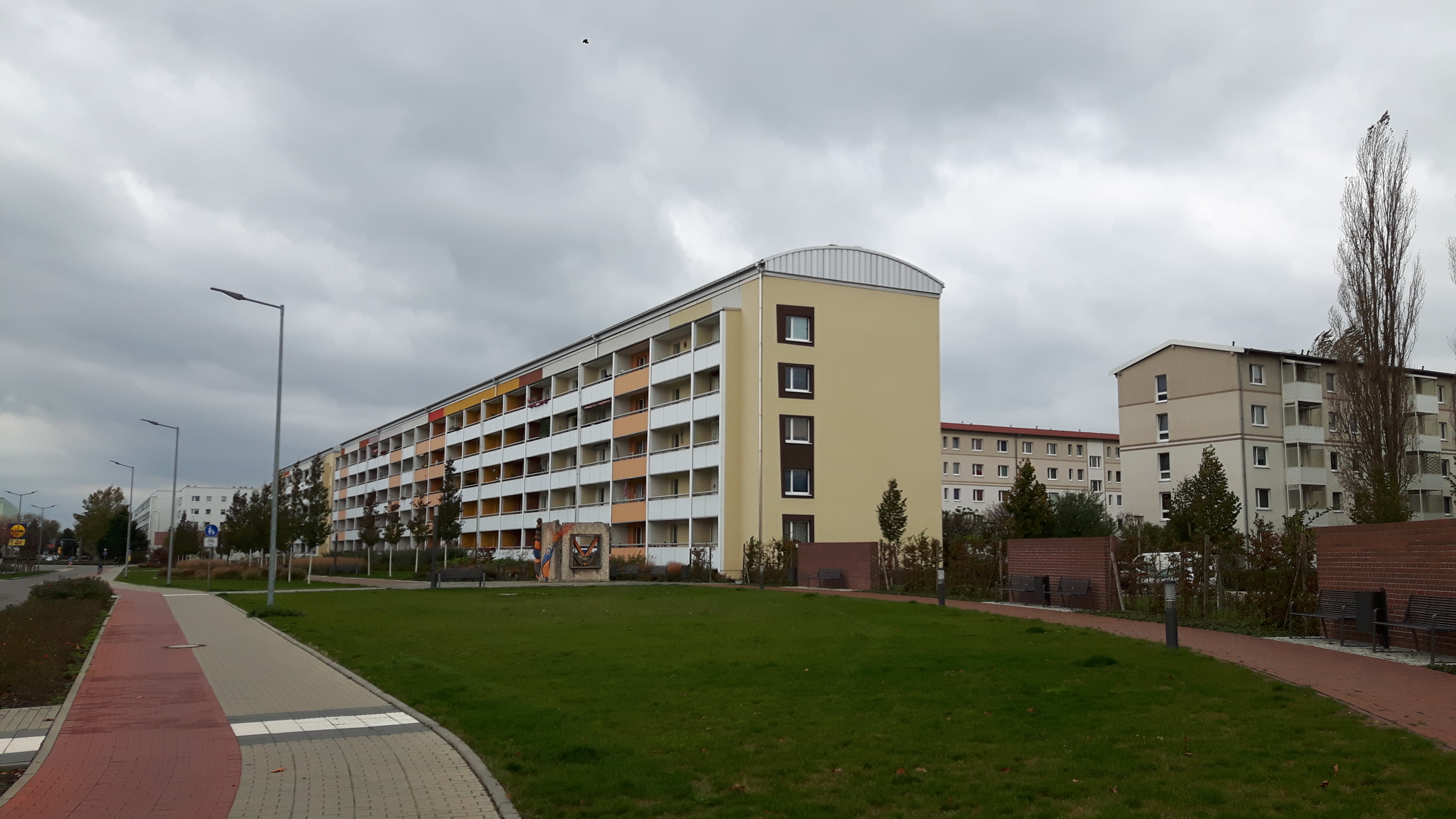 Plattenbauwohnkomplex in der Geschwister-Scholl-Straße, fotografiert auf der Otto-Grotewohl-Straße aus Südosten.